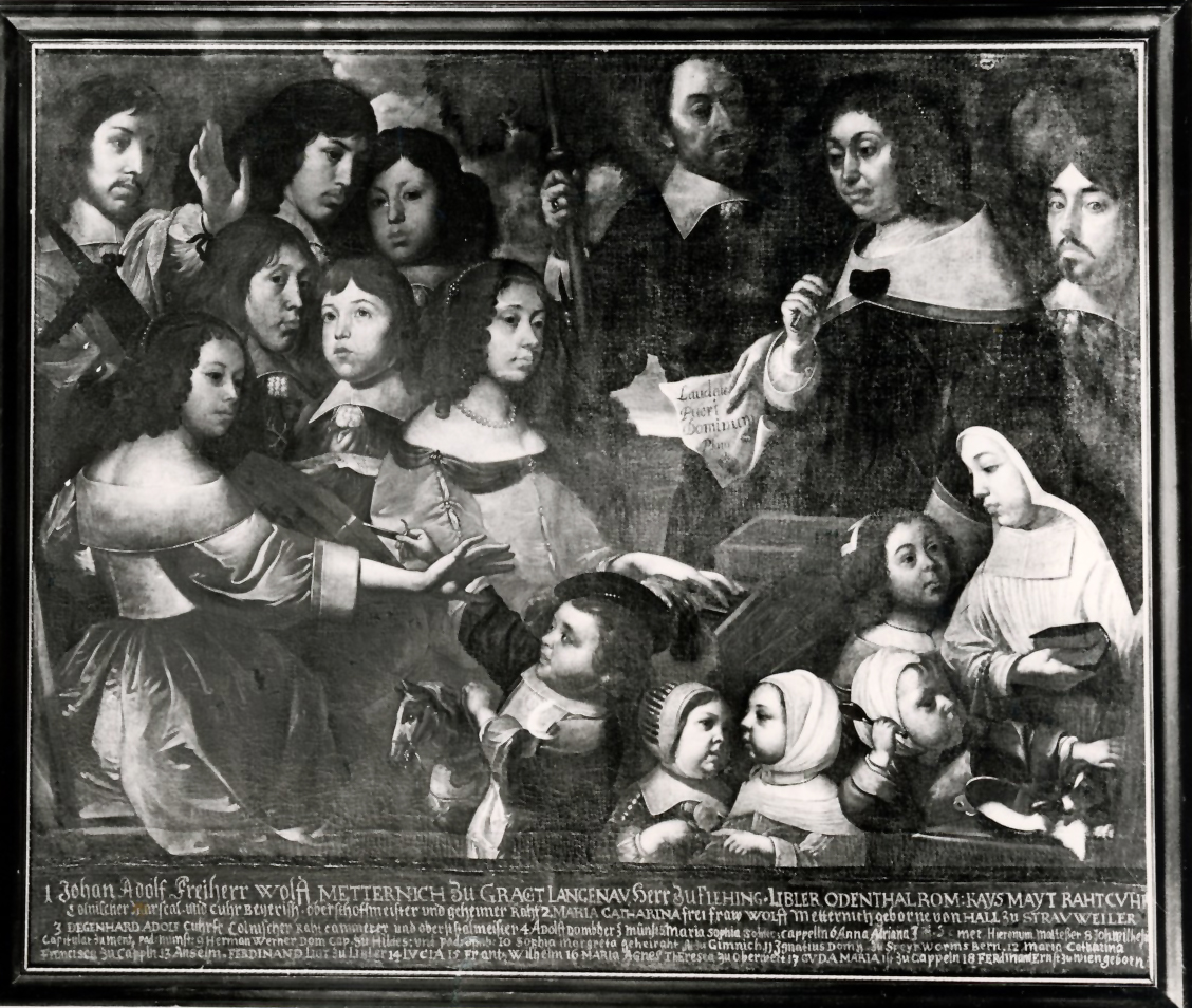 Die Familie des Freiherrn Johann Adolf Wolff Metternich, 17.Jahrhundert